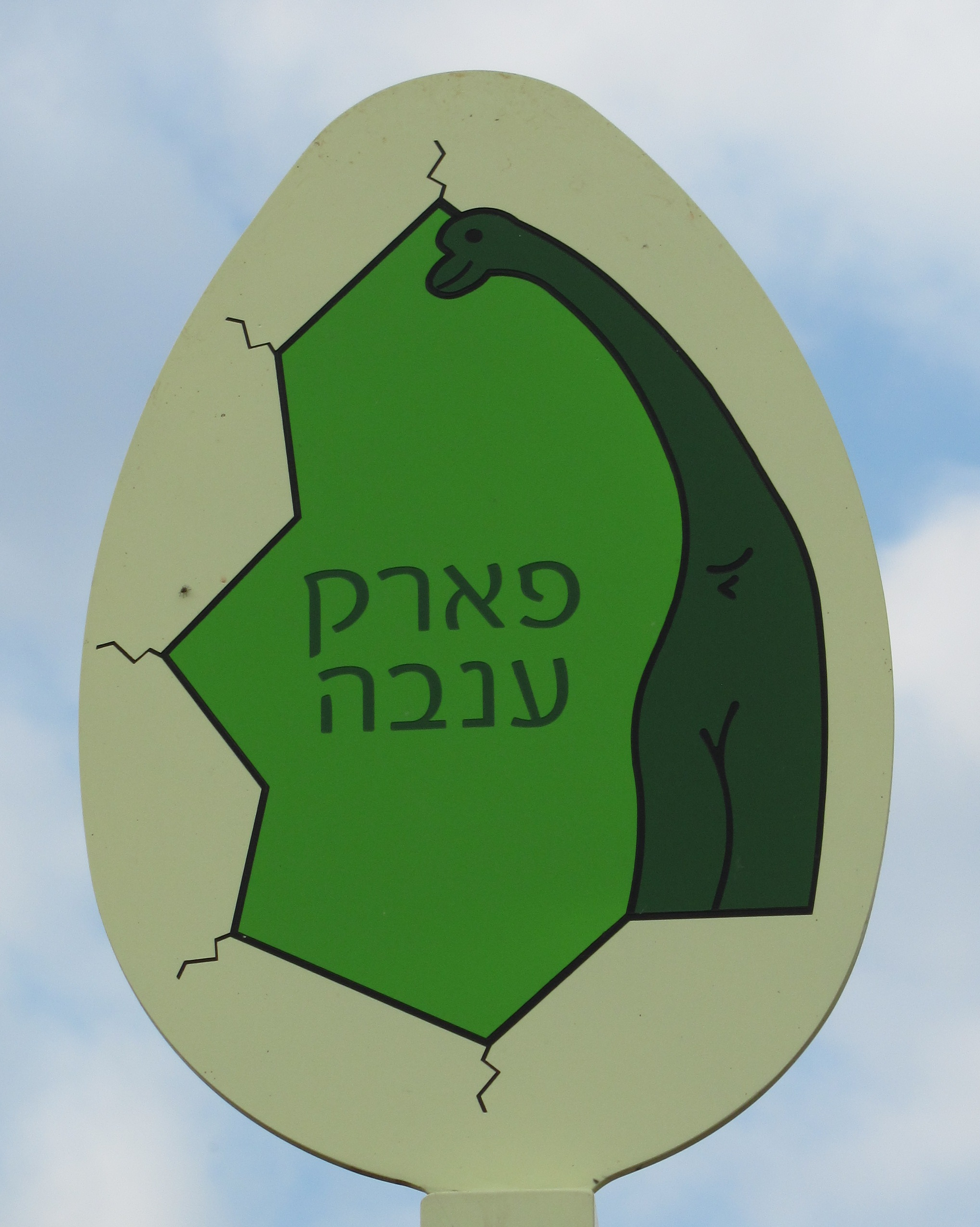 לוגו של פארק ענבה במודיעין